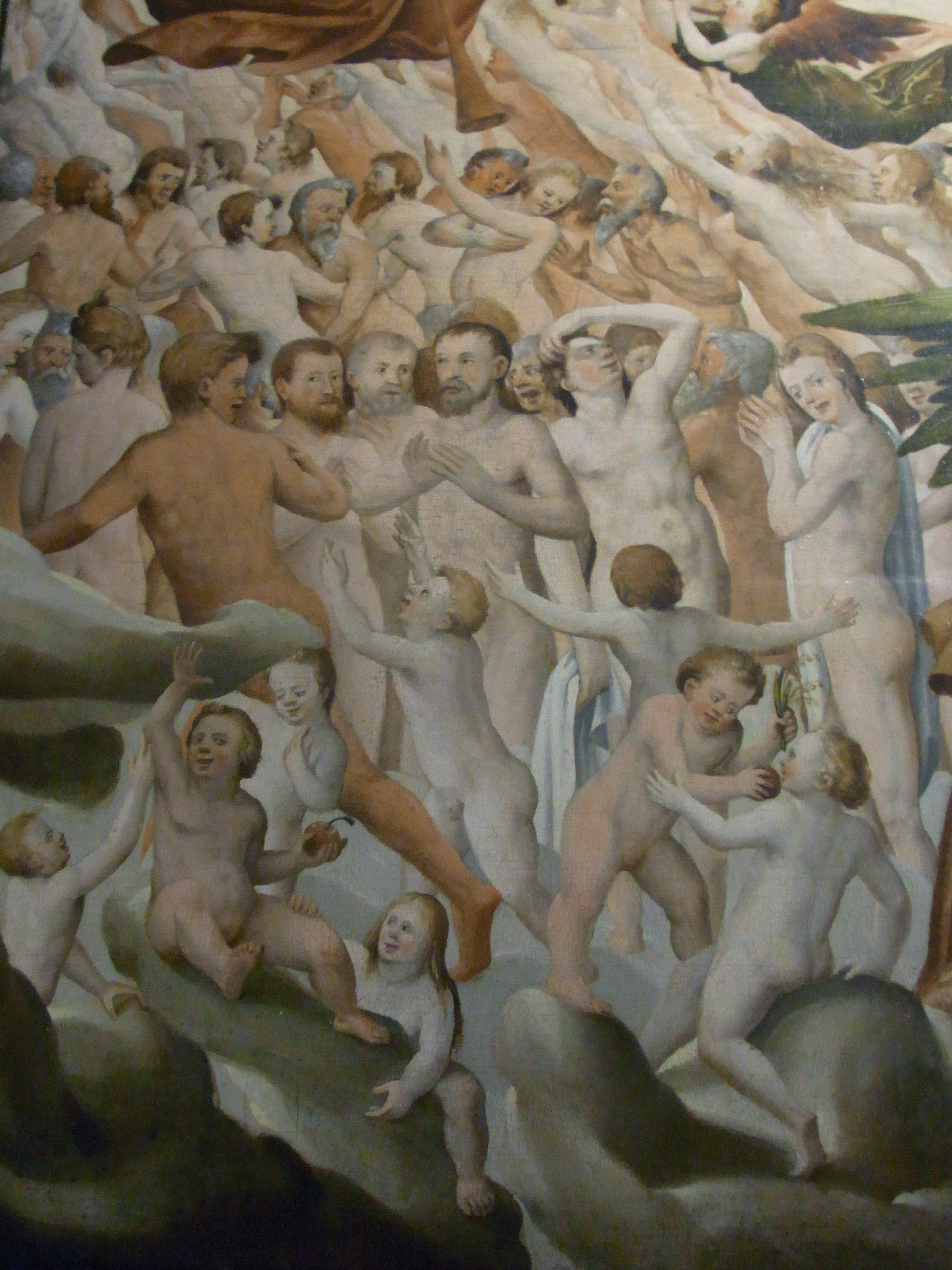 Georg Rieder (um 1510 - 1564): Jüngstes Gericht aus der Gerichtsstube des Ulmer Rathaus; Mitte 16. Jahrhundert